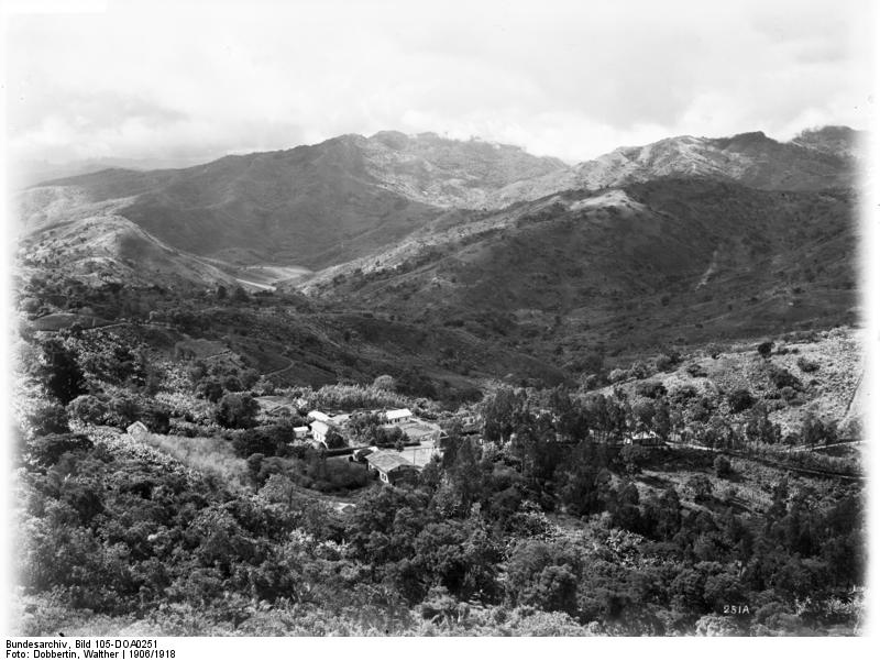 Mission Bumbuli in Usambara